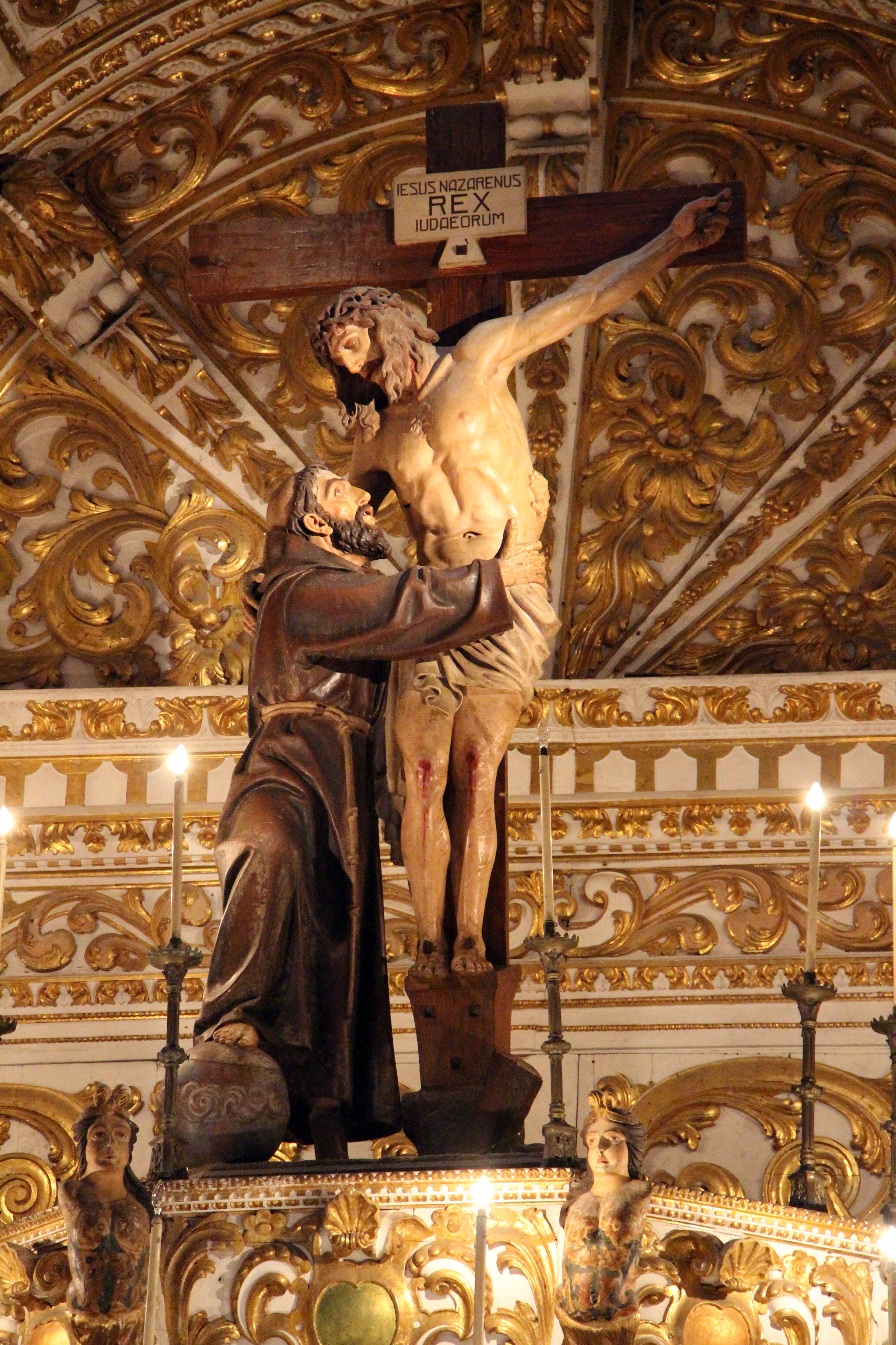 Igreja de São Francisco (Salvador)